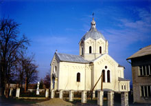 Церква у с. Надітичі (Миколаївський деканат). 1914 р., архітектор В. Нагірний (1848—1921)